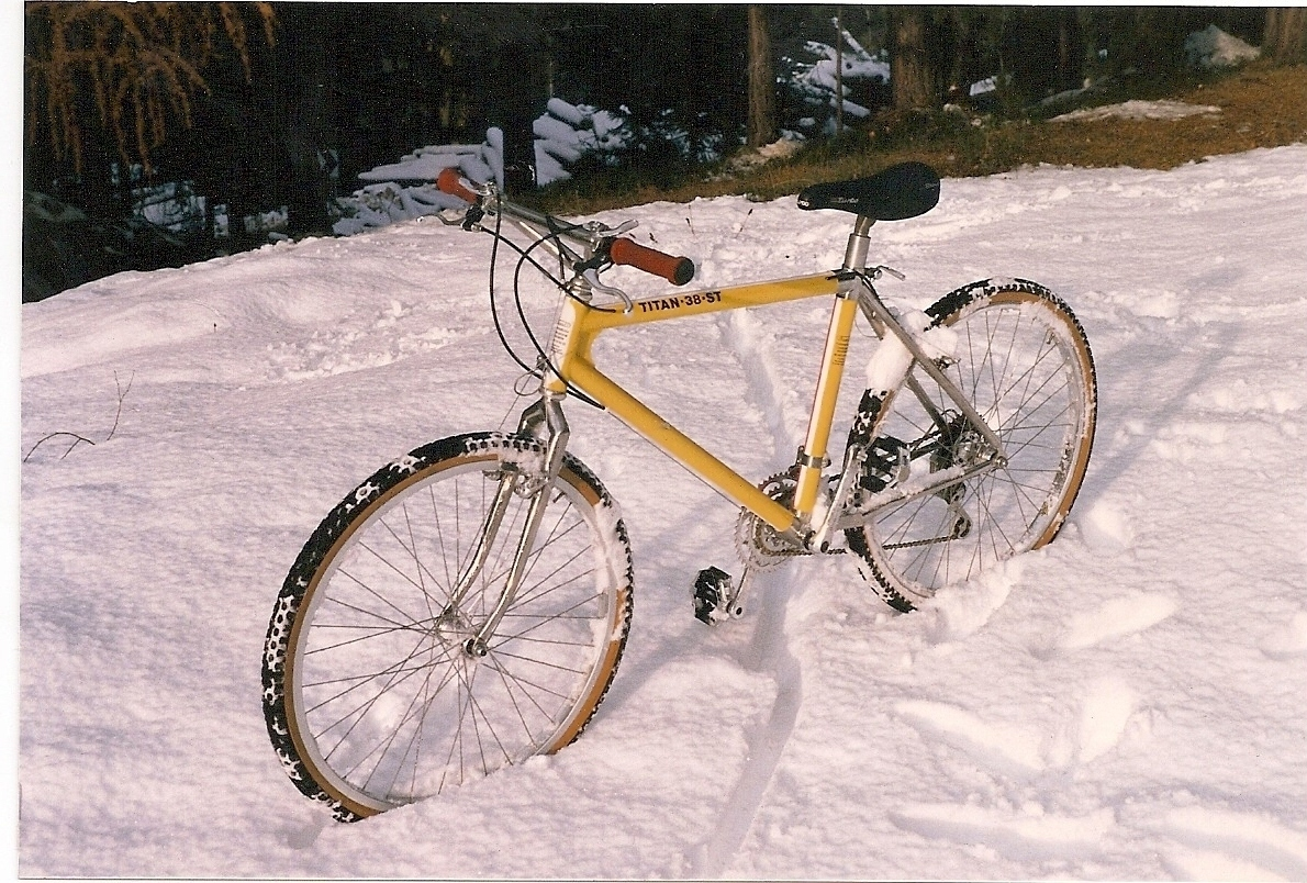 Das erste Titan-Bike von Rewel